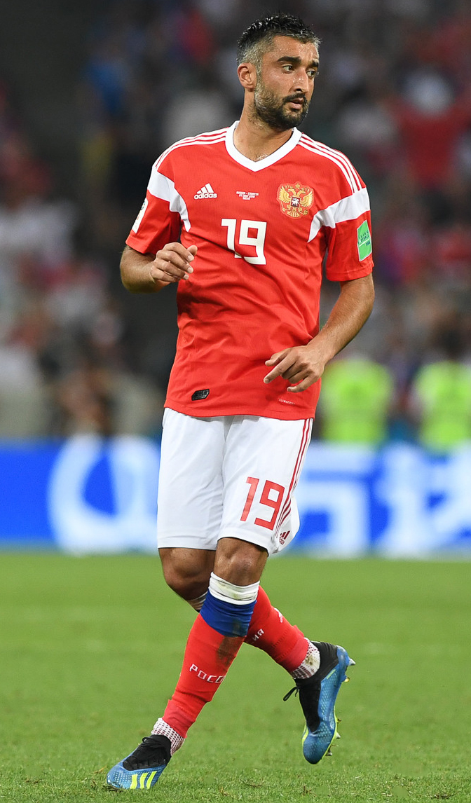 Сборная России заканчивает ЧМ-2018 с поднятой головой. Хорватия выходит в полуфинал